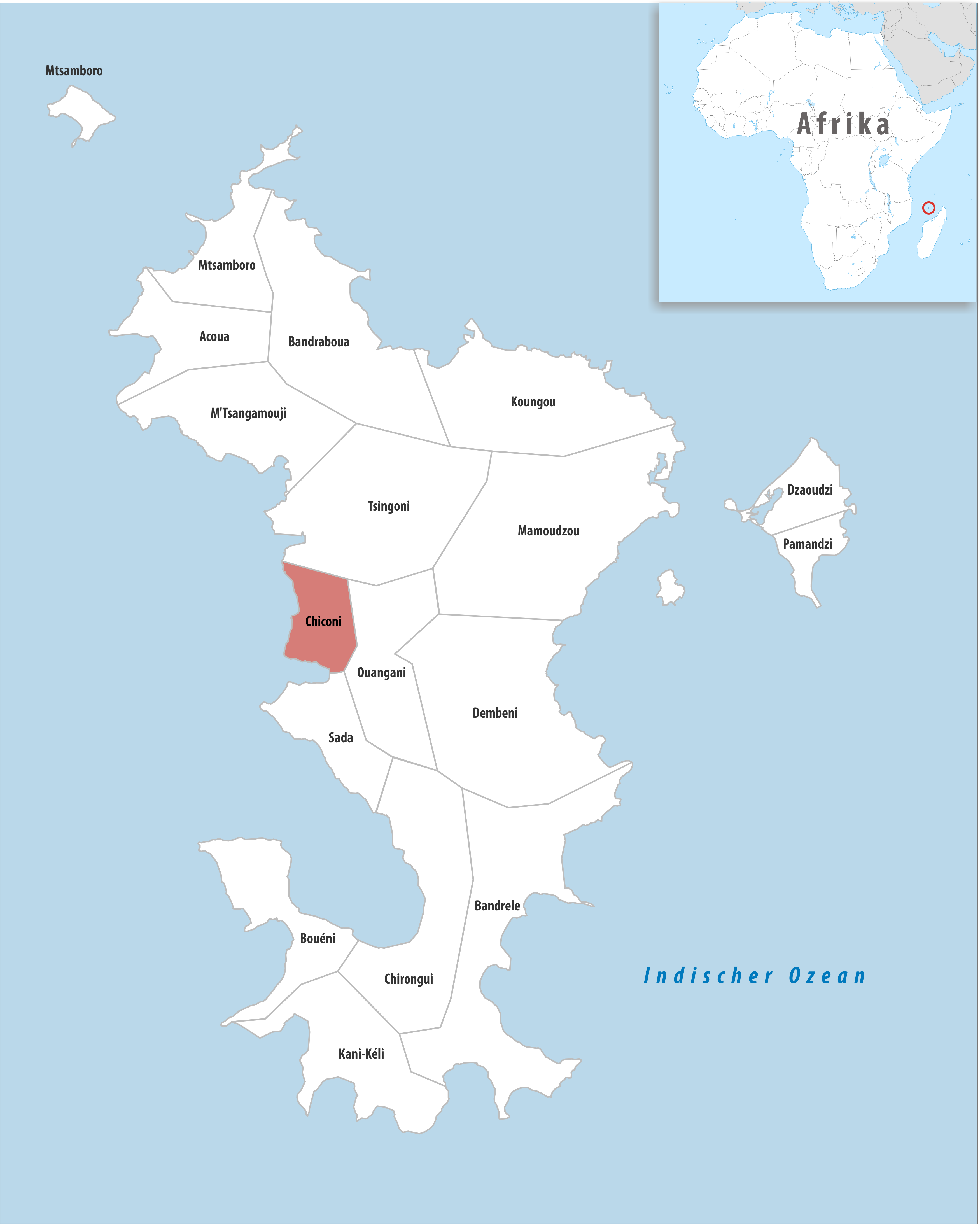 Lage der Gemeinde Chiconi